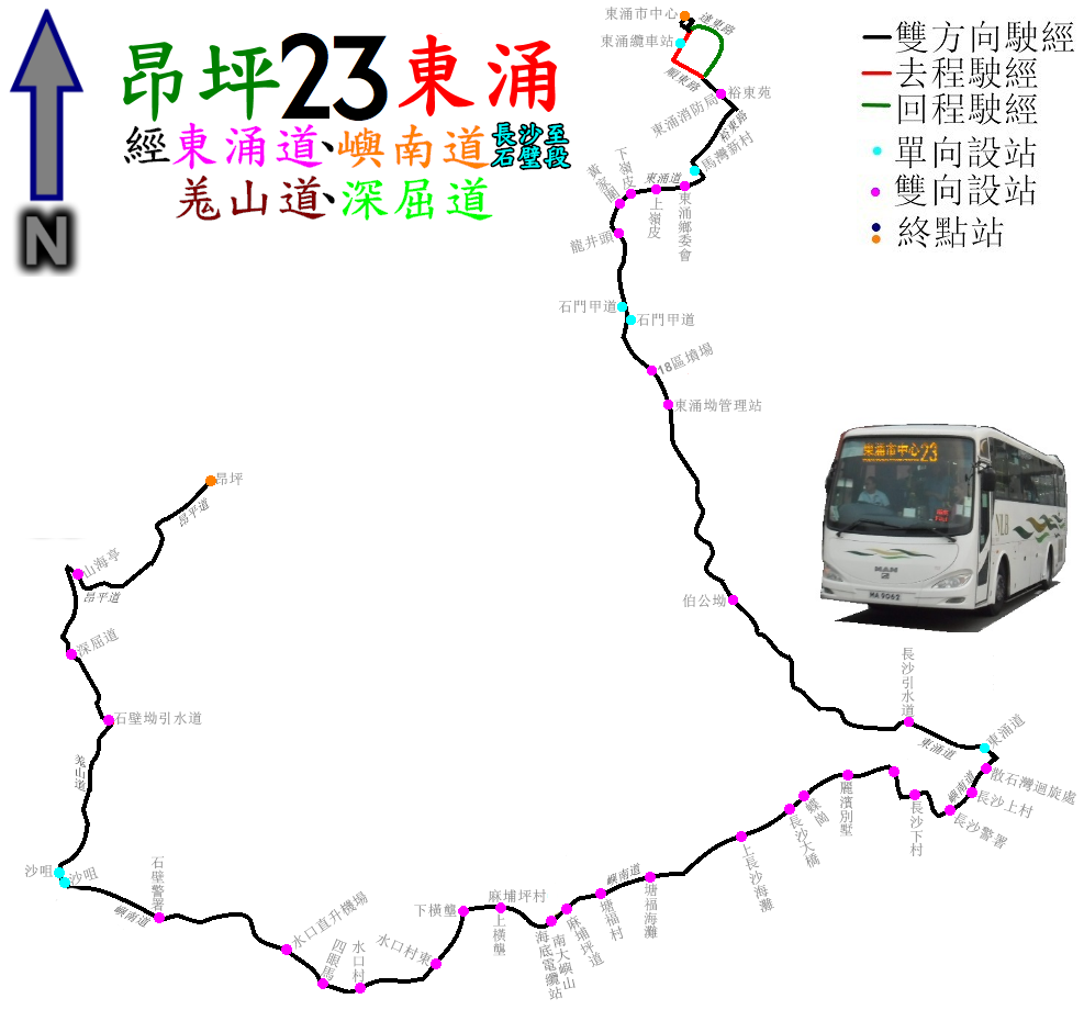 中文（香港）: 新大嶼山巴士23線的走線圖